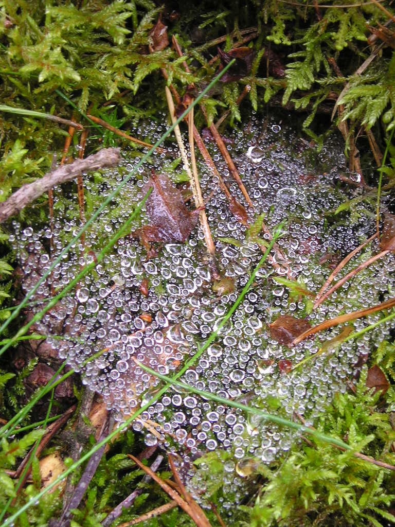 HARMAT CSEPPEK